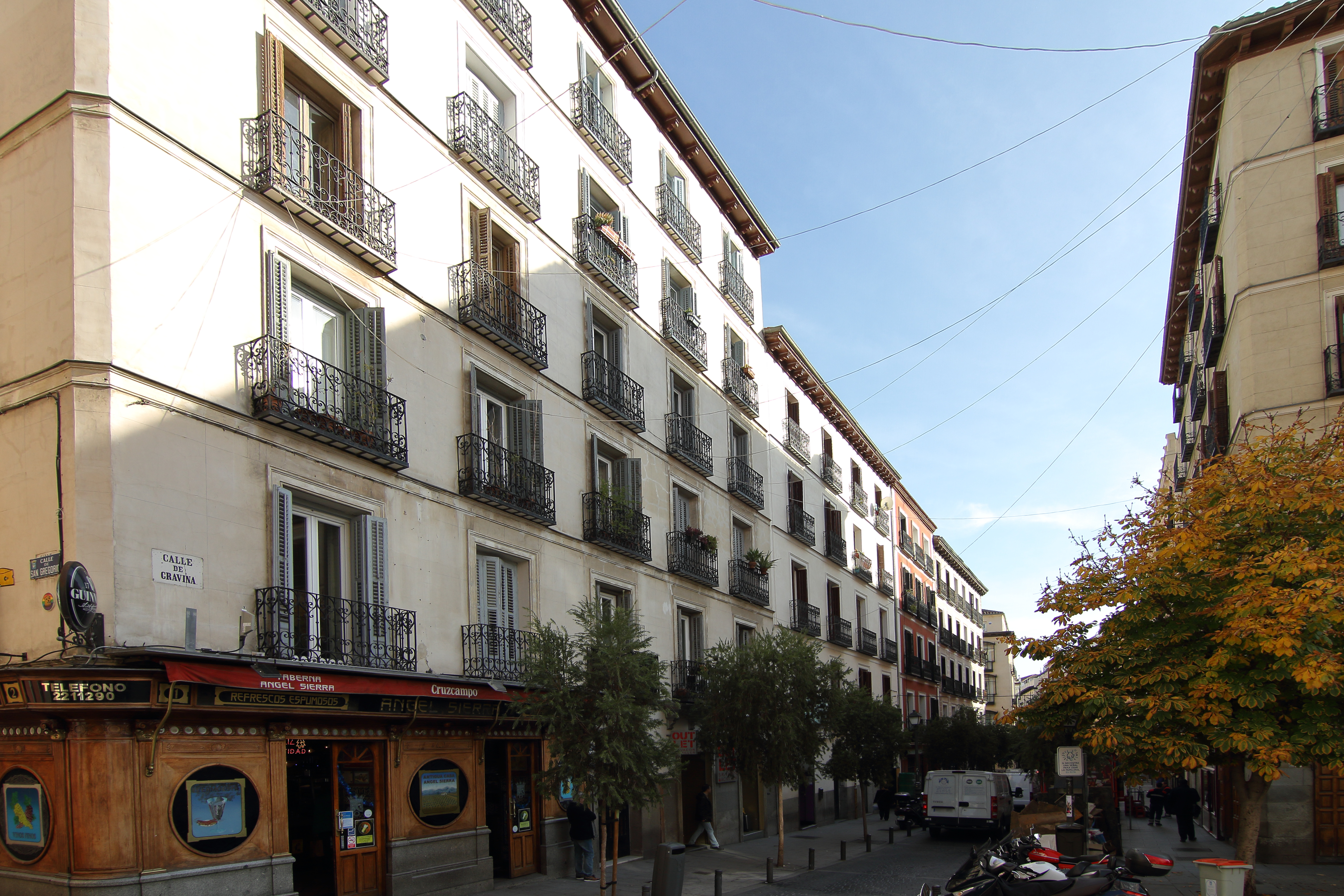 Calle de Gravina, desde la plaza de Chueca